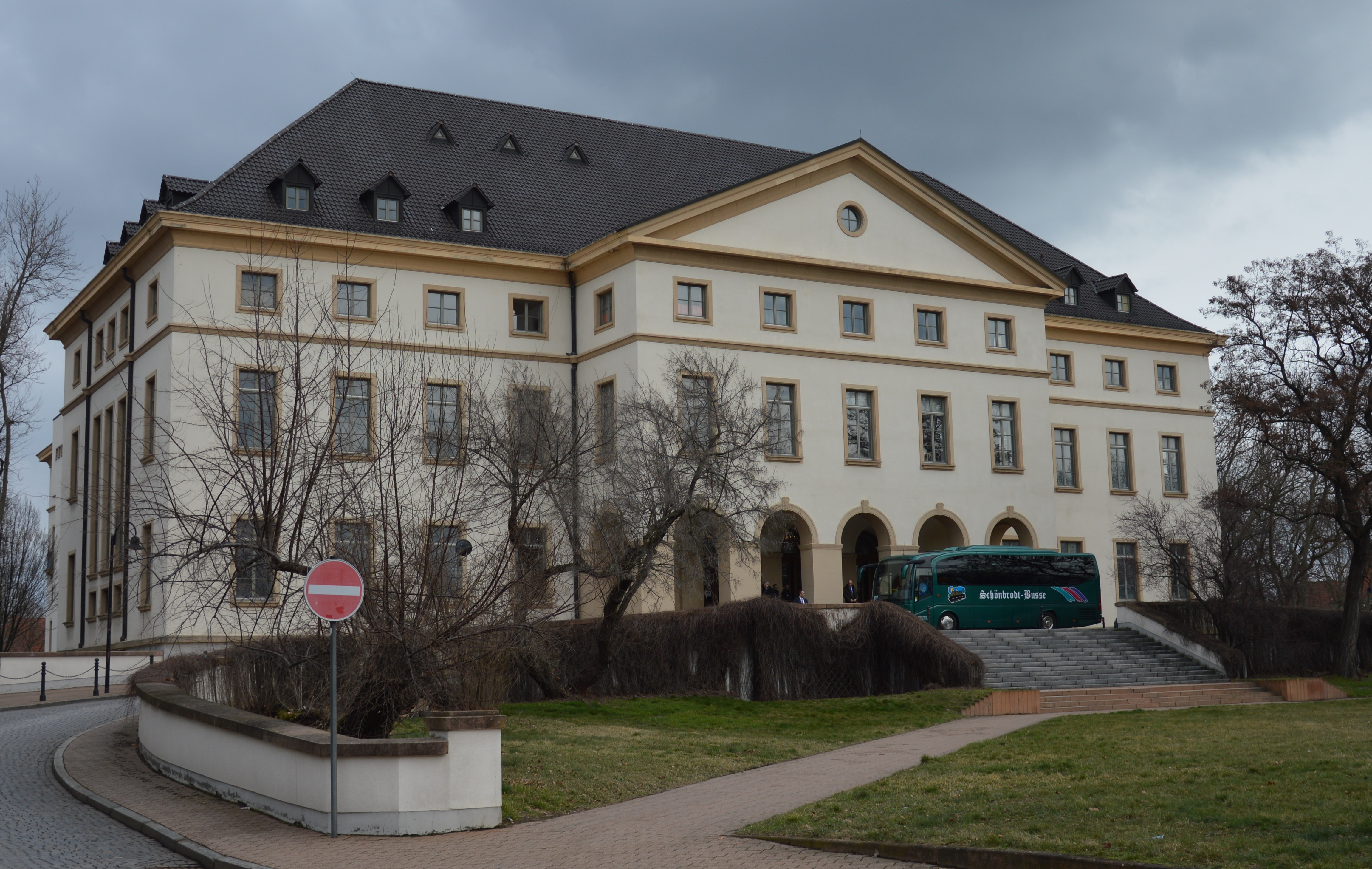 Kulturhaus Leuna